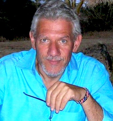 Ritratto di Pietro Gorini